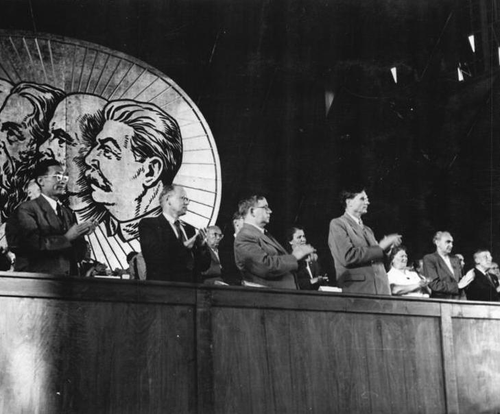 Zentralbild-Quasch Qu 7294-50-25.7.50 III. Parteitag der SED vom 20. - 22.7.1950 Vom 20. - 22.7.1950 fand in Berlin in der Werner-Seelenbinder- Halle der III. Parteitag der Sozialistischen Einheitspartei Deutschlands statt. Letzter Tag der III.Parteikonferenz der SED am 24.7.50 UBz Blick auf das Präsidium. Von Links nach rechts: Ssuslow, Pospelow Fred Oelsner. Auf.: Illus-Quaschinsky Be.7294-50 163 25.7.50